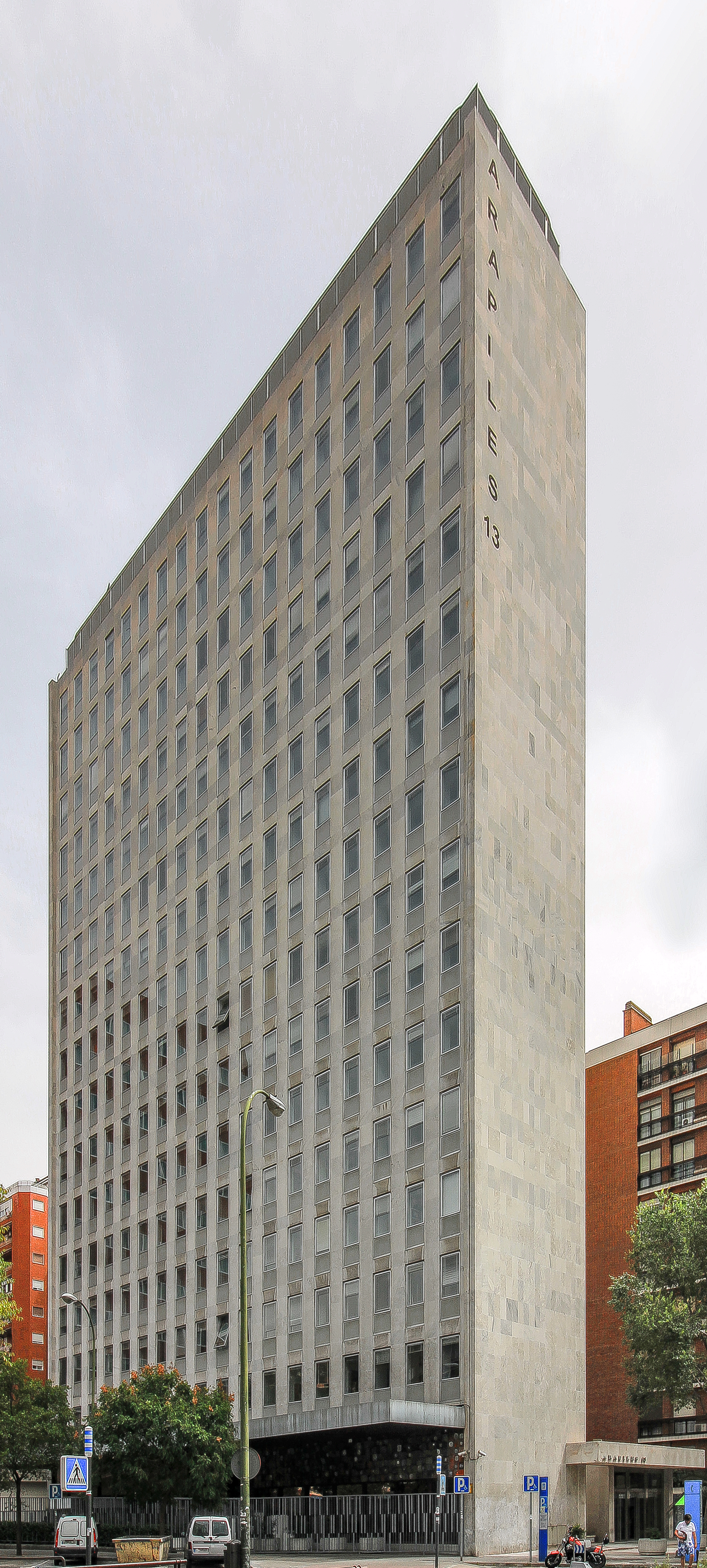 Mejora perspectiva fotografía Arapiles13